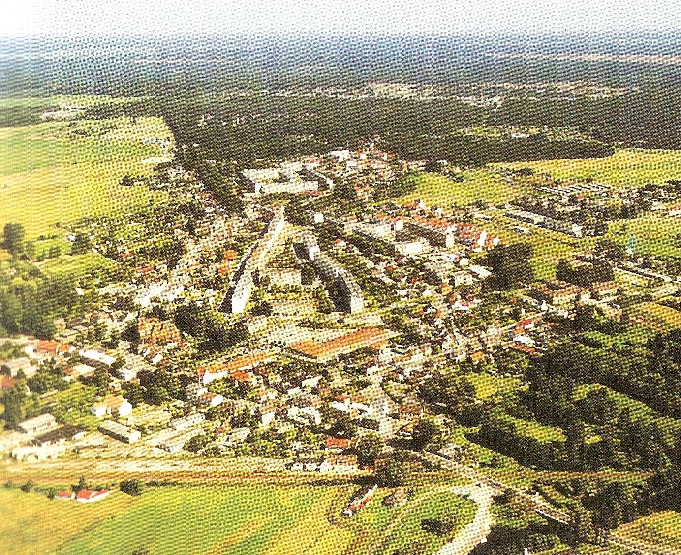 Eggesin aus der Luft 1997